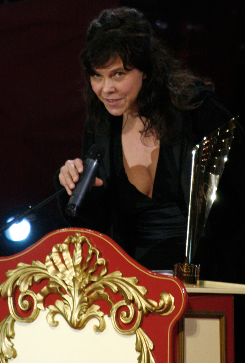 Claudia Bosse (theatercombinat) mit dem Auszeichnung für die beste Off-Produktion während der Verleihung des Nestroy-Theaterpreises 2009 (Circus Roncalli auf dem Wiener Rathausplatz).